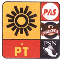 Alianza por México